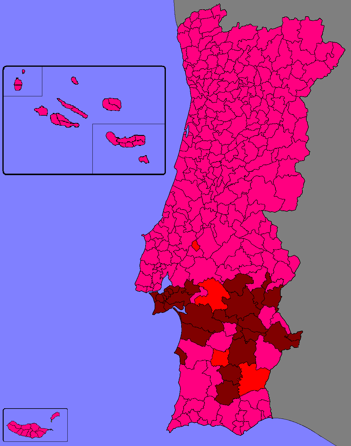 Mapa ilustrativo do candidato mais votado por concelho (Magenta - Ramalho Eanes/Castanho - Otelo Saraiva de Carvalho/Vermelho - Otávio Pato)